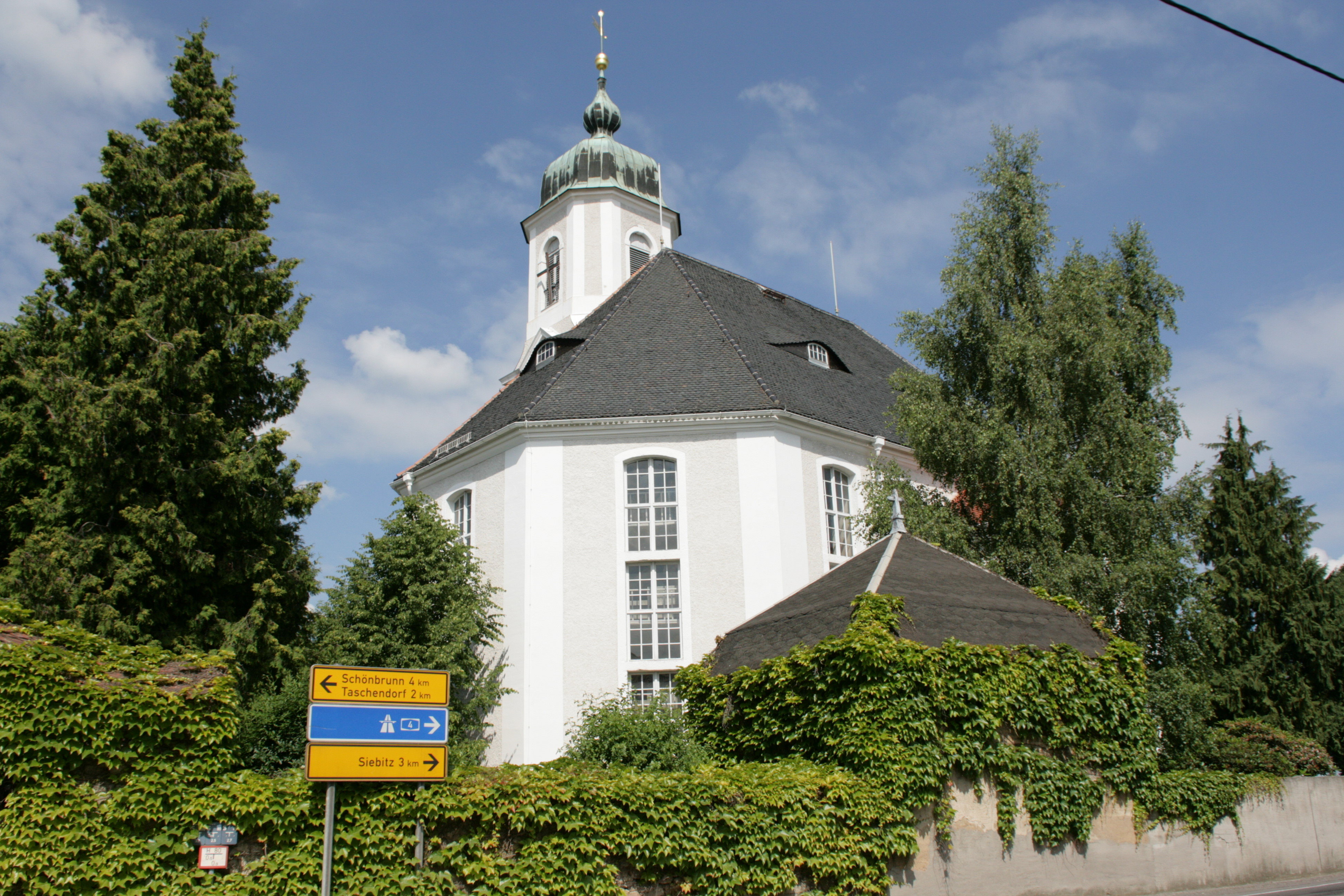 Evangelische Autobahnkirche (Parochialkirche Peter & Paul), Taucherwaldstraße 73, Uhyst am Taucher, Burkau